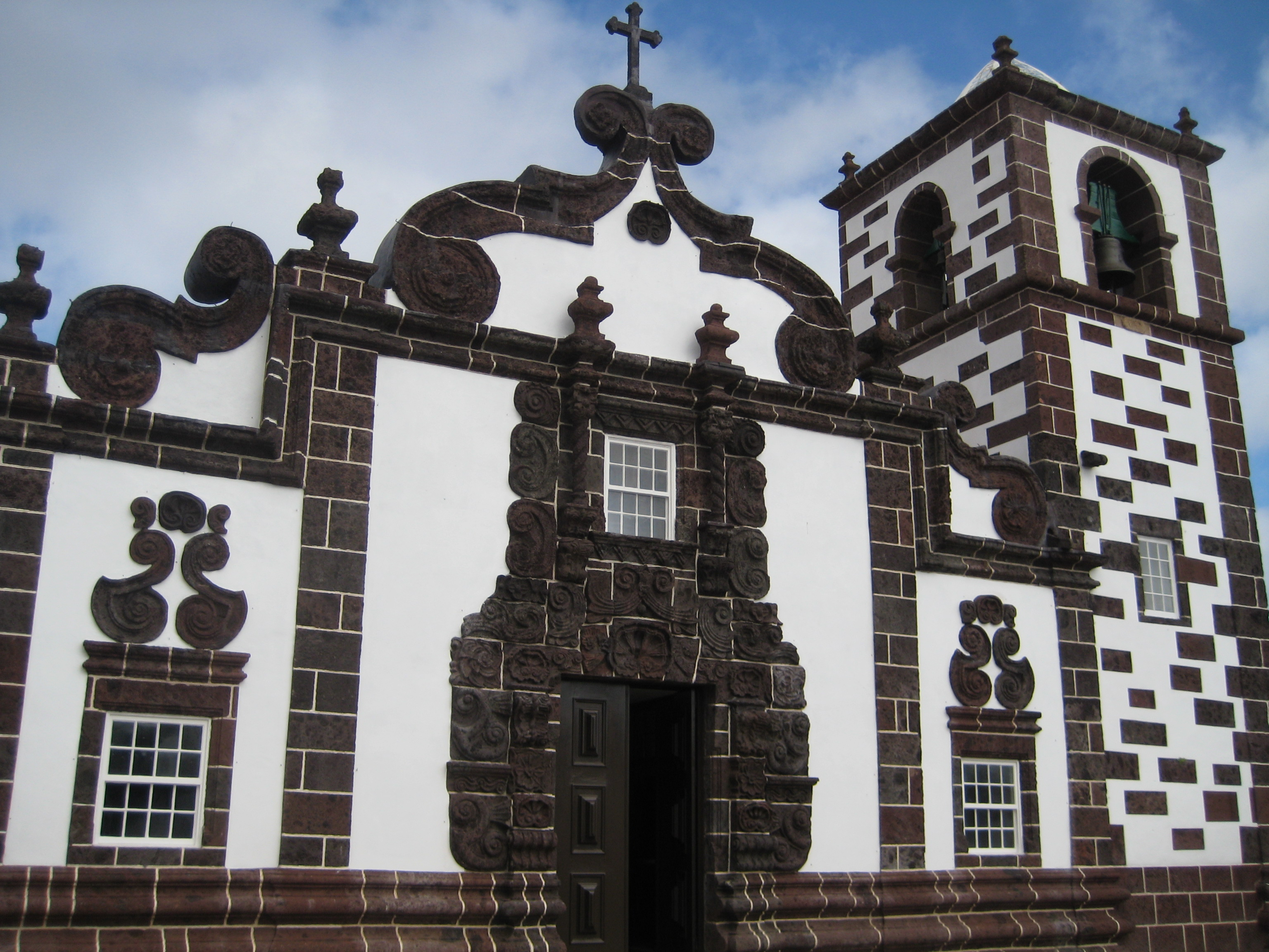 Iglesia de Sancto Espirito